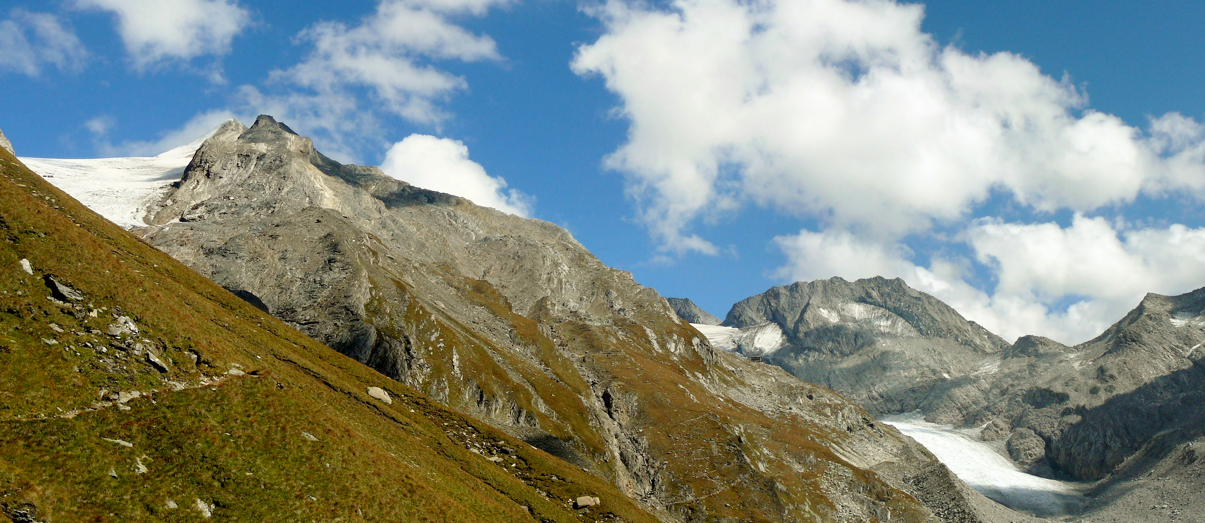 Gran Pilasto e rifugio